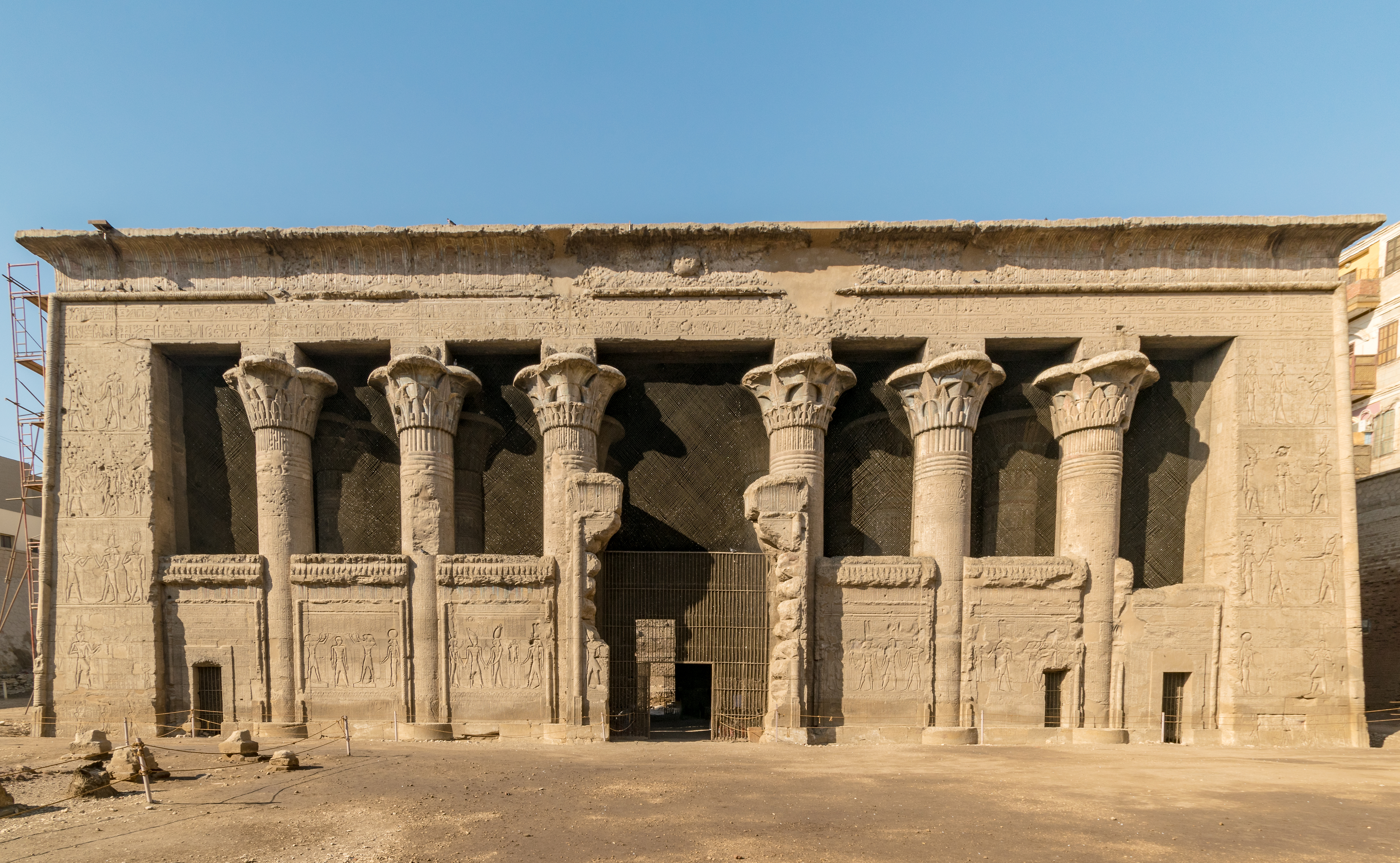 Frontansicht vom Säulensaal des Esna Tempels